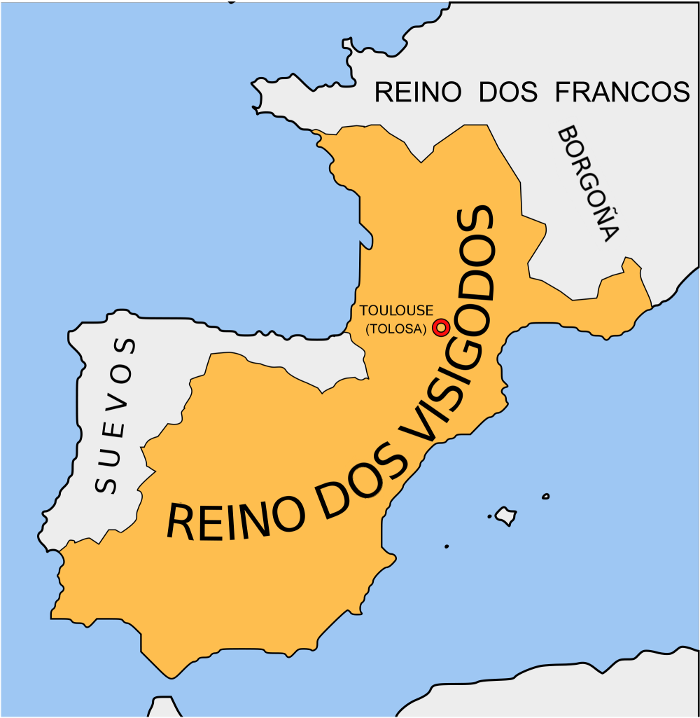 Territorio del reino visigodo bajo el mando de ALARICO II.